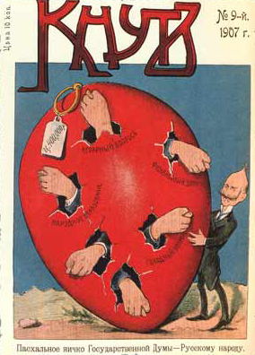 Карикатура на В. В. Шульгина из журнала "Кнут"